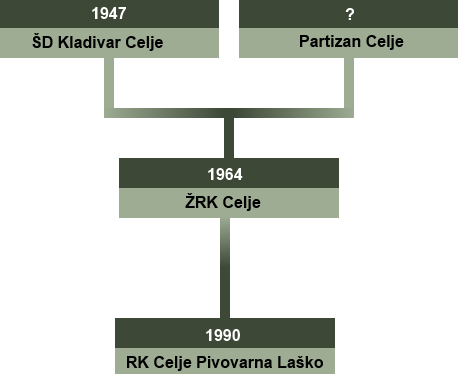 Liste des fusion du RK Celje